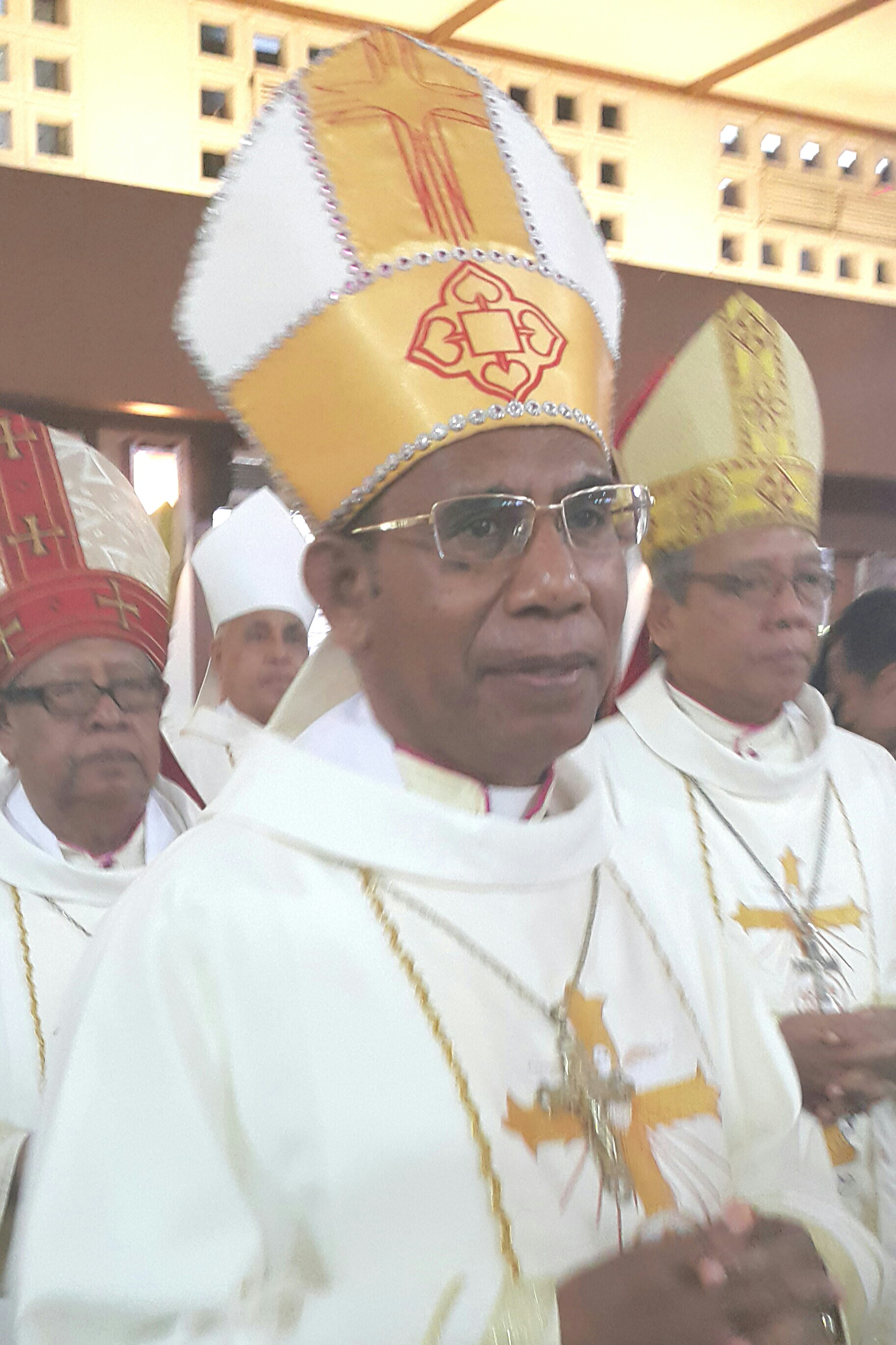 Mgr Dominikus Saku, Uskup Atambua